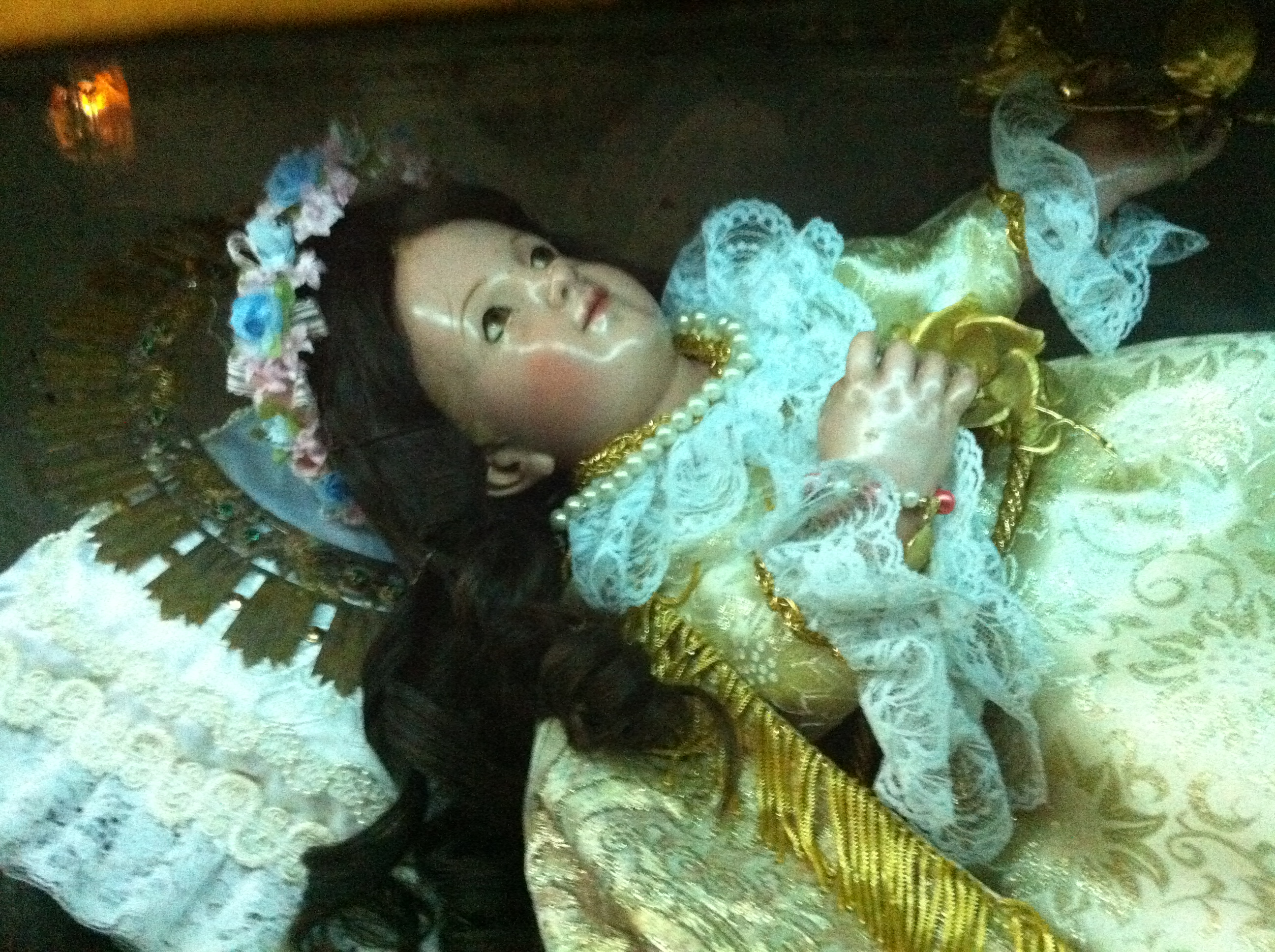 Es una imagen de la Divina Infantita que se encuentras en la Basílica de Zapopan